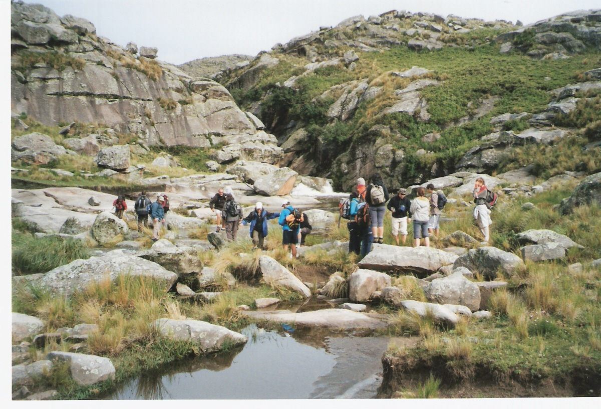 Senderos en el Cerro Champaquí. Cordoba-Argentina